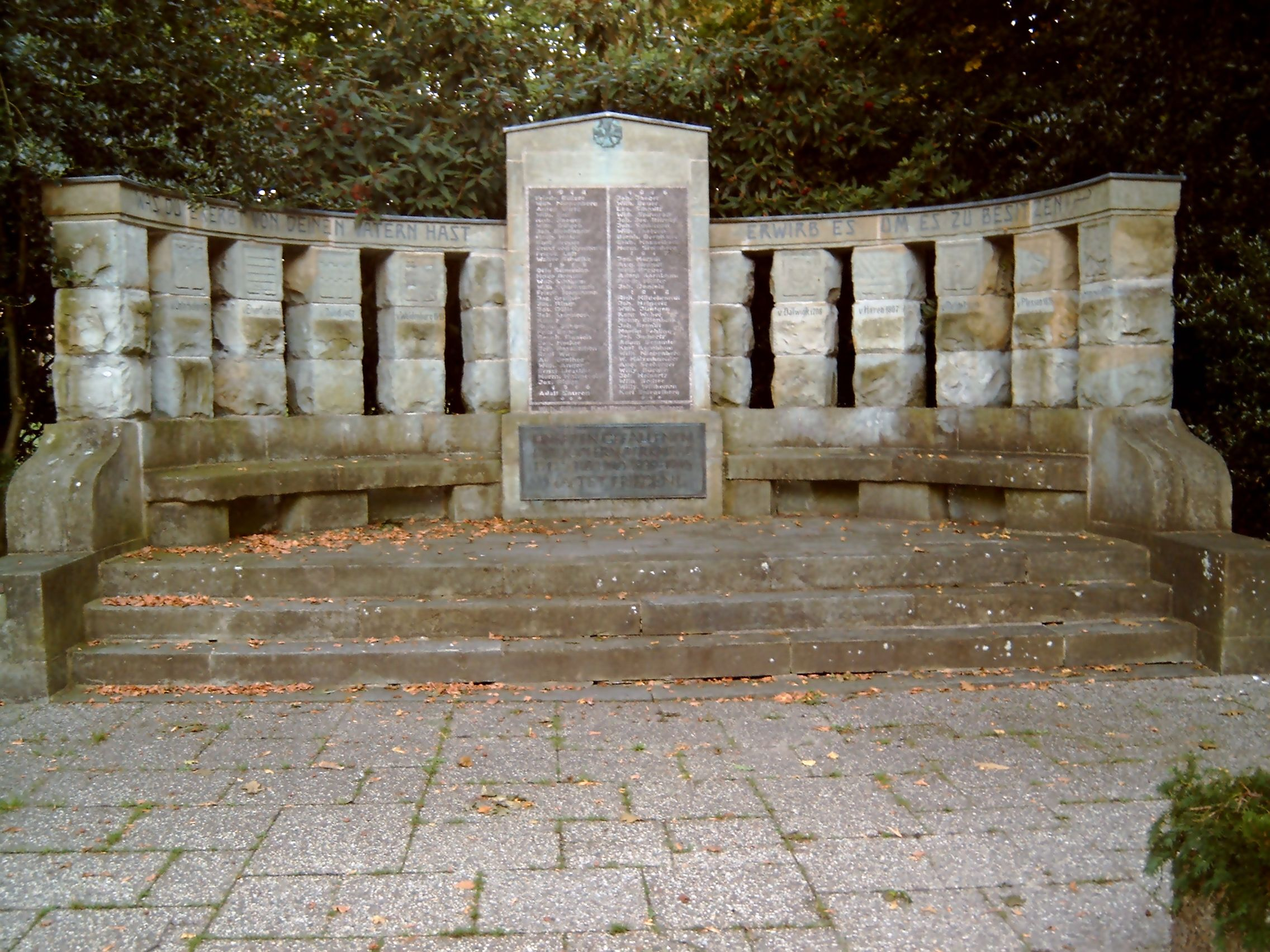 Unterbacher Denkmal vor dem Friedhof in Düsseldorf-Unterbach. Auf der Tafel in der Mitte werden die Namen der Gefallenen des 1. Weltkriegs genannt. Wappen und Namen der Herren von Haus Unterbach sind in die Pfeiler gemeißelt. In 1913 eingeweiht war dies das Kaiser-Jubiläumsdenkmal. Damals auf der mittigen Tafel das Konterfei des Kaisers. Werk des Düsseldorfer Bildhauers Joseph Hammerschmidt.